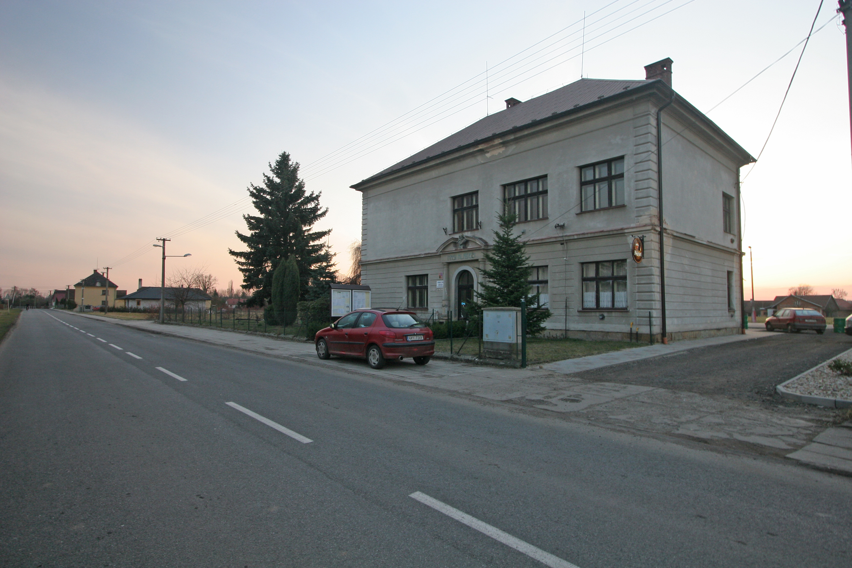 Nevratice obecní úřad